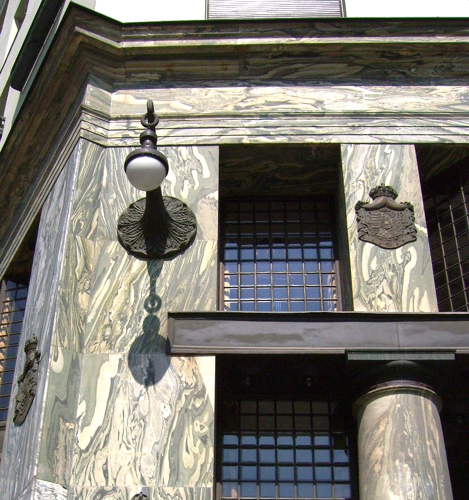 Looshaus (Ausschnitt), Author: Anima, April 2007